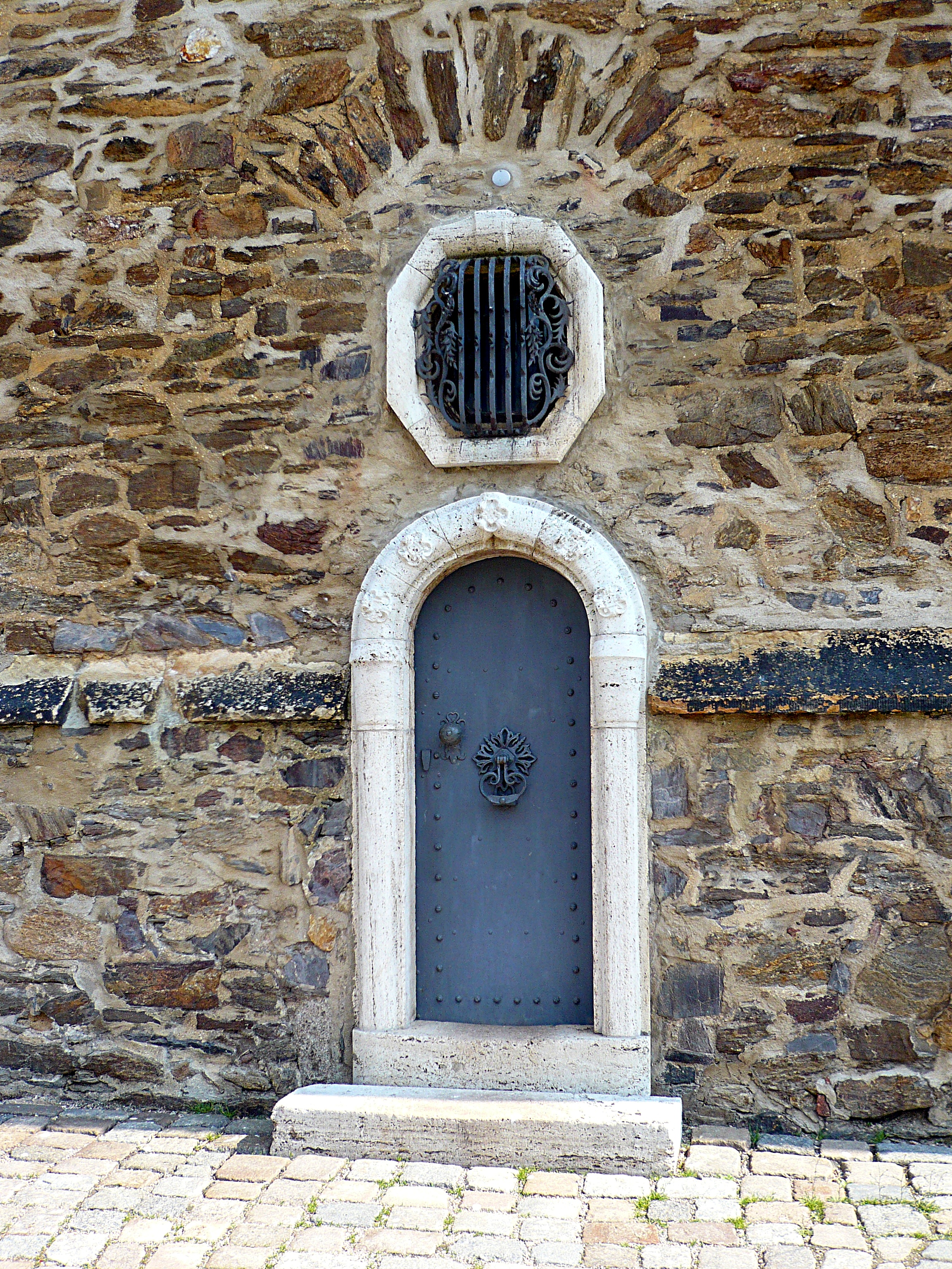 St. Wolfgangs-Kirche, Schneeberg: Eingangsbereich zum Kirchturm